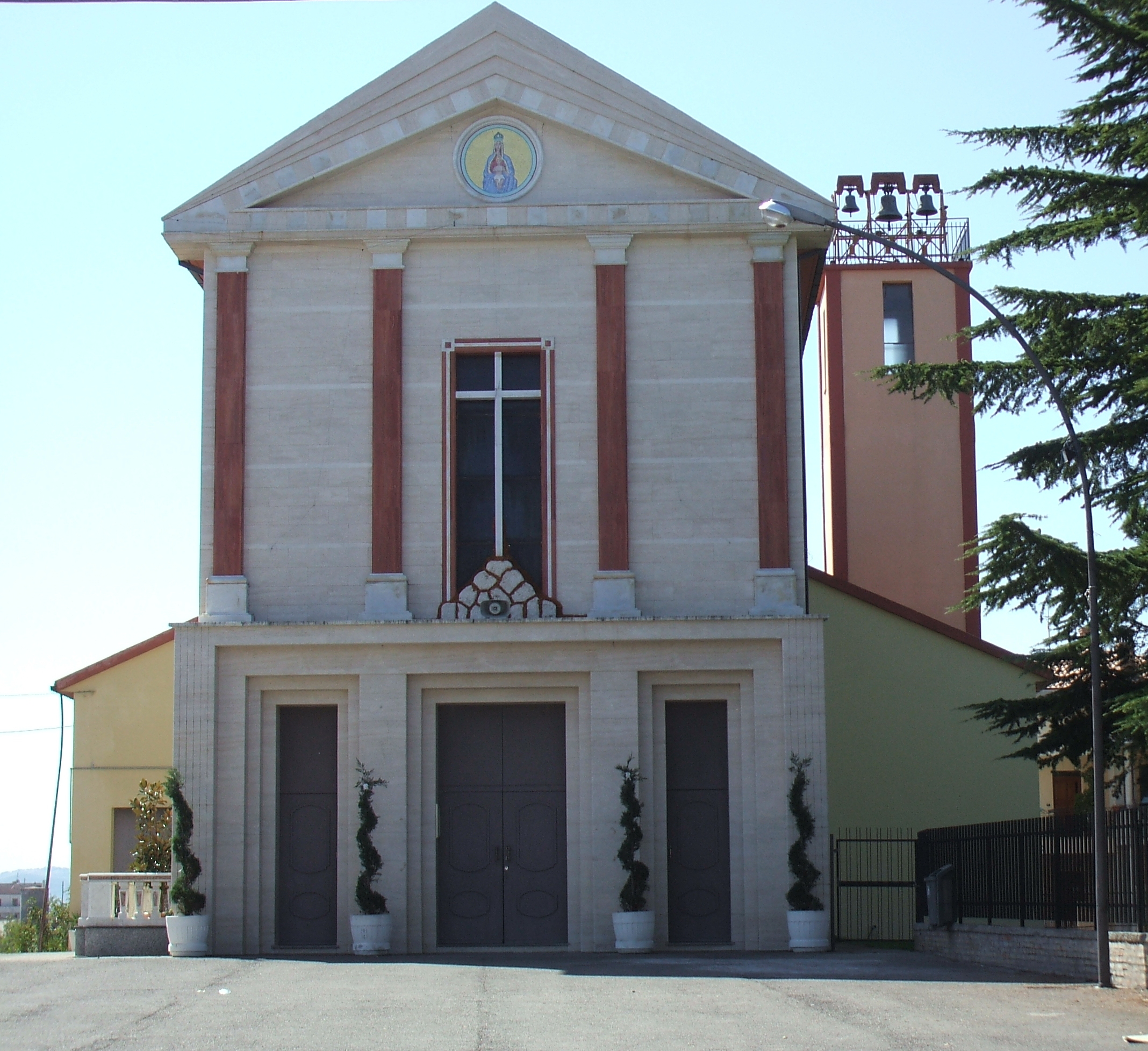 Santuario Madonna della Strada, Scerni CH, Italy